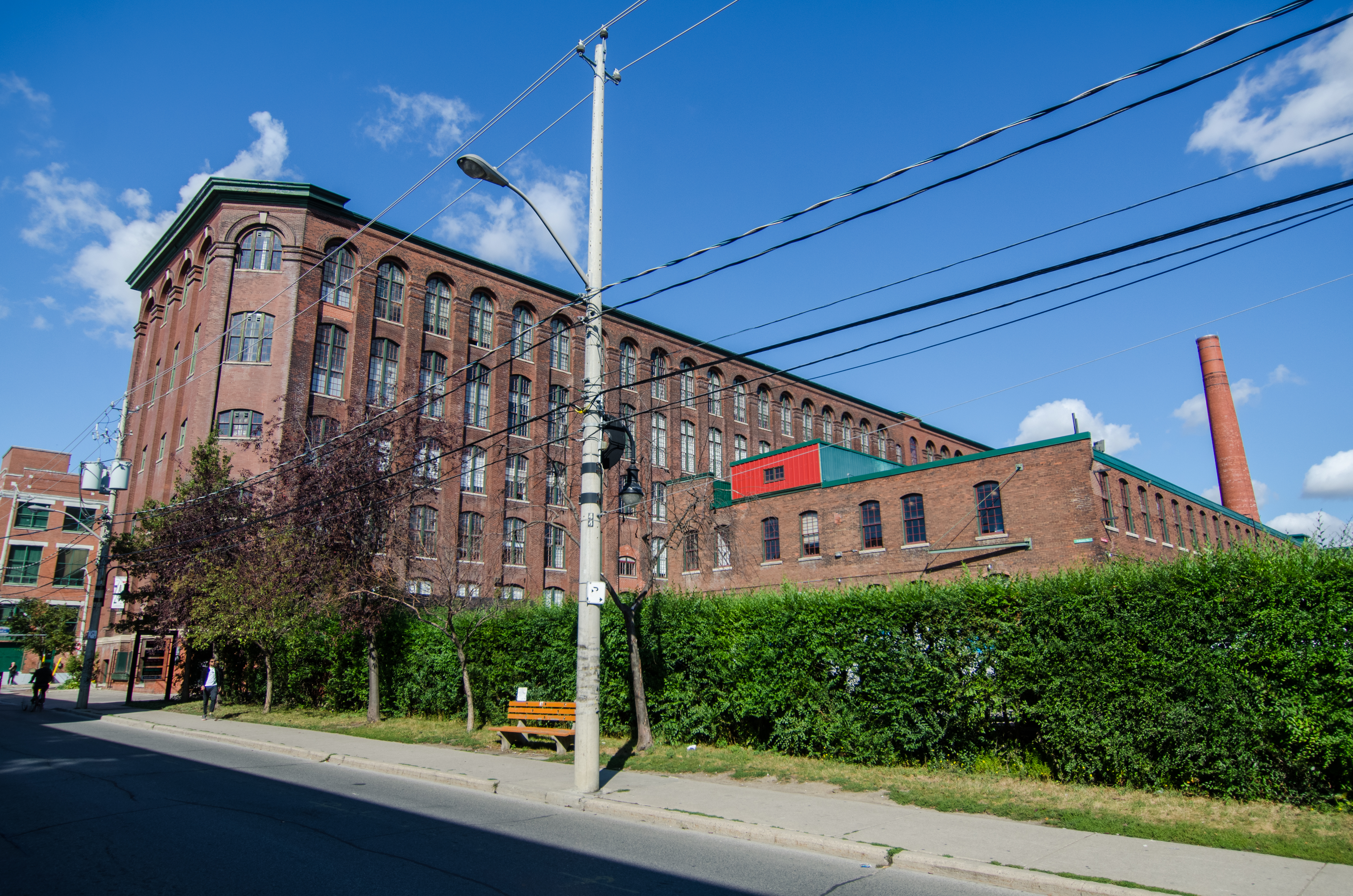 Seen in Shadowhunters episode #208.